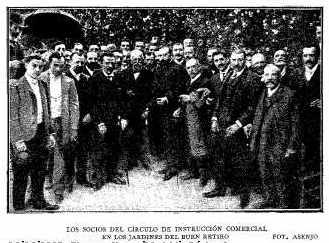 1903 Los socios del Circulo de Instruccion Comercial en los Jardines del Buen Retiro en ocasion del XXI aniversario de su fundacion